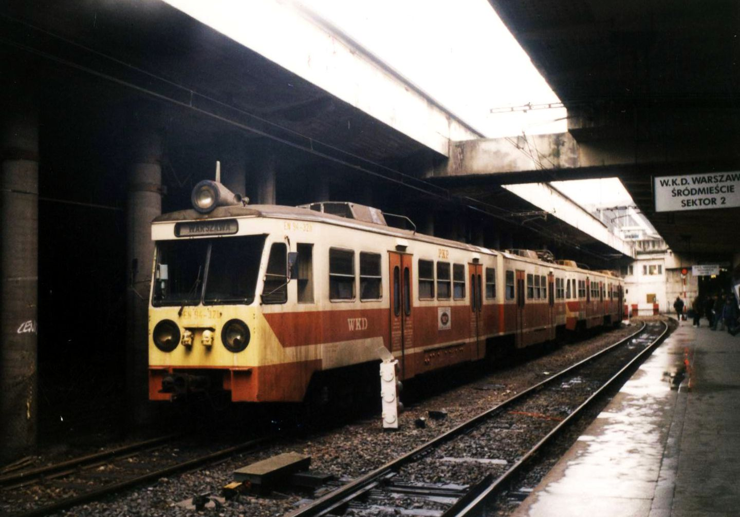 Elektryczny zespół trakcyjny EN94-32 na stacji Warszawa Śródmieście WKD.